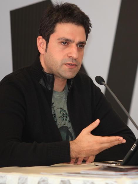 Gazeteci seminerleri Erhan Çelik